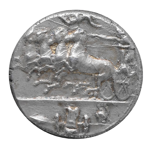 Syracuse Dekadrachm c400 BCE obv